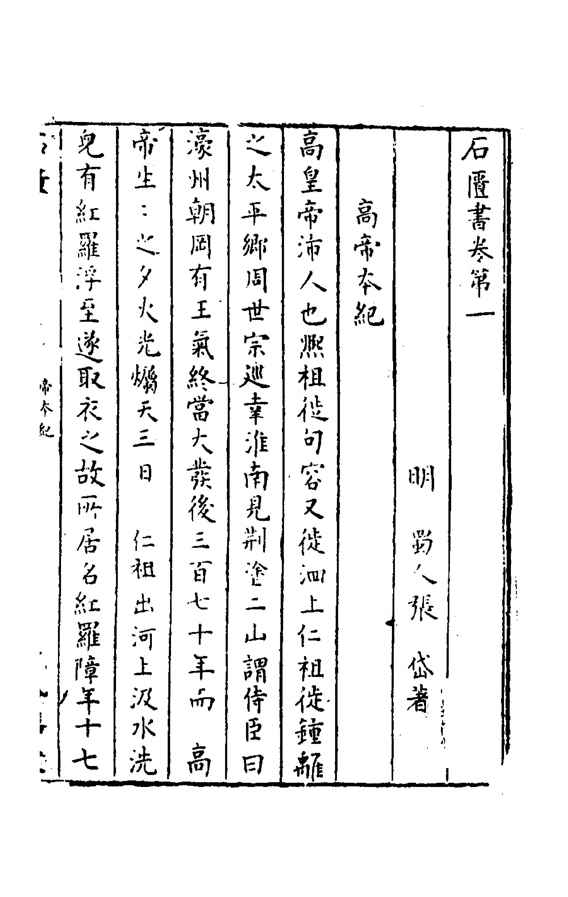 中文（中国大陆）: 石匮书卷一1